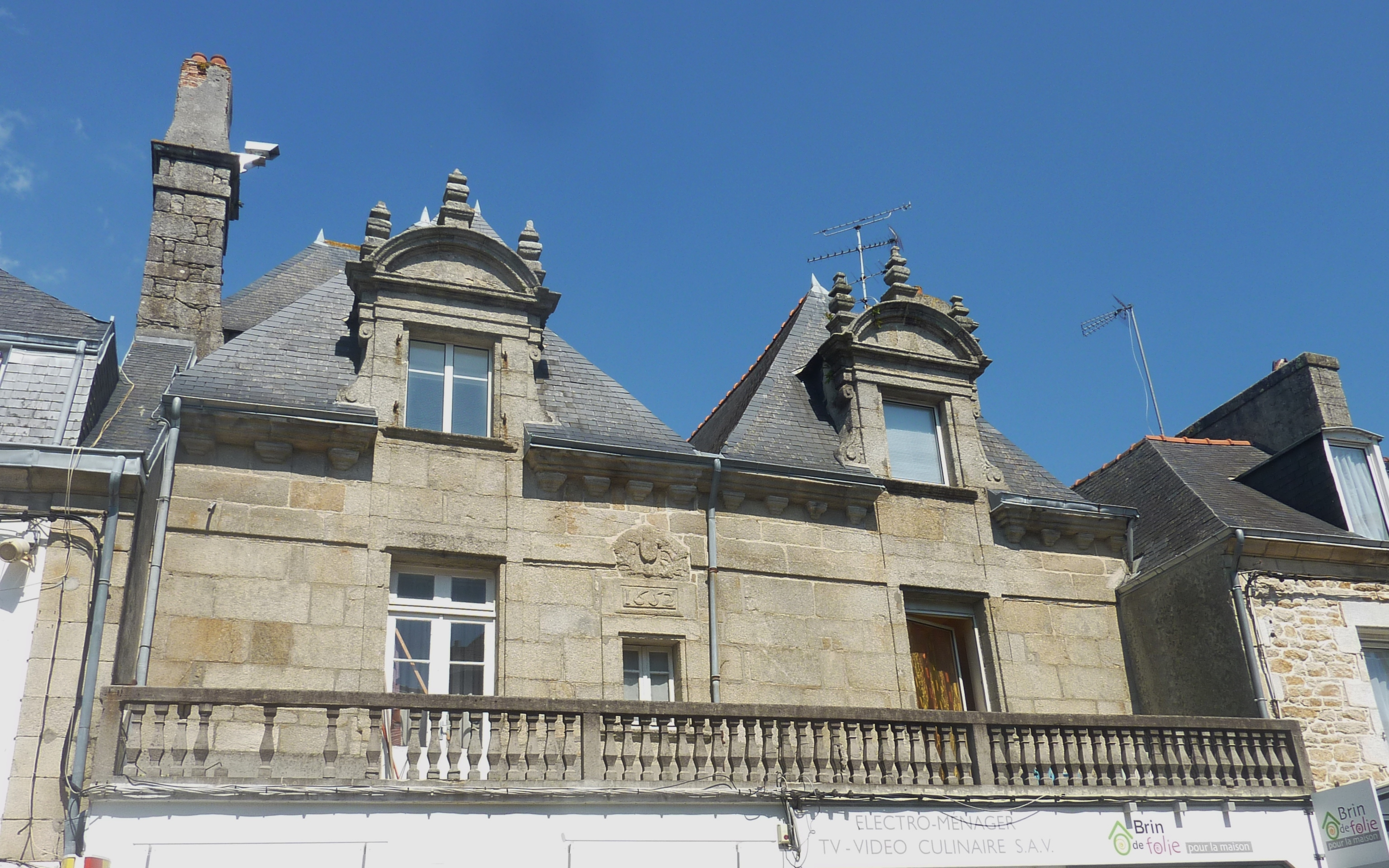 Pont-l'Abbé : hôtel particulier datant de 1652 situé 14, rue De Gaulle (seul l'étage est montré sur cette photo, le rez-de-chaussée est occupé par des boutiques)